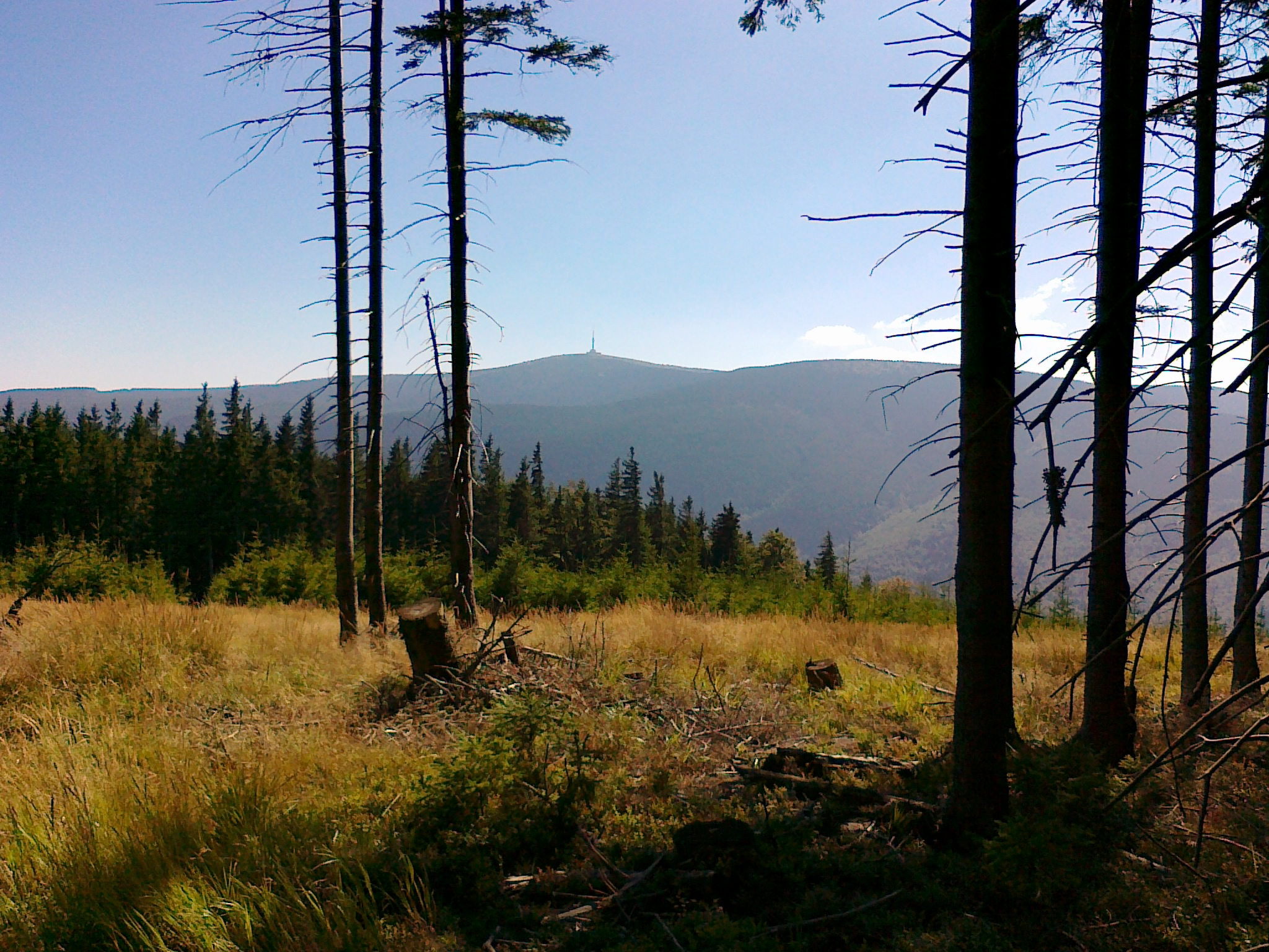 Widok z połaci szczytowej góry Lysý vrch - 1128 m n.p.m. w kierunku góry Pradziad